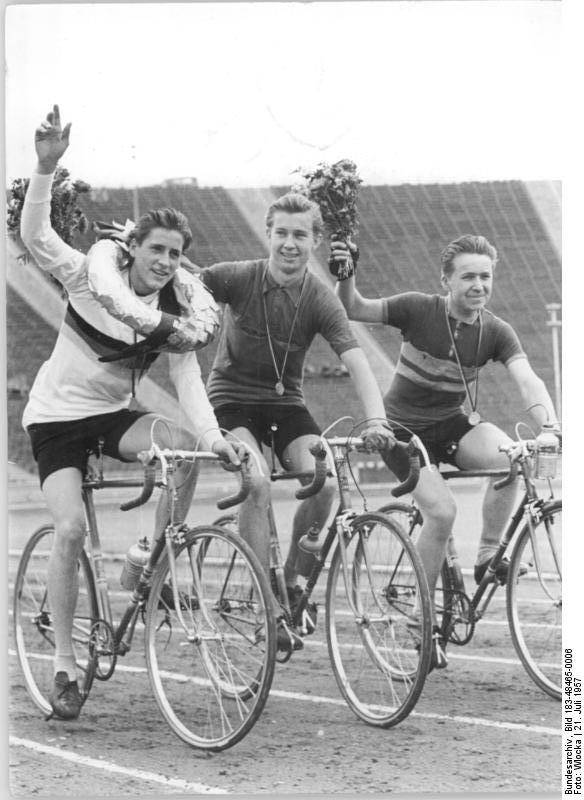 Zentralbild Wlocka Son-Noa 21.7.1957 Turn- und Sporttreffen der Jugend in Leipzig. Höhepunkt der festlichen Tage in Leipzig war die Siegerehrung der jungen Sportlerinnen und Sportler. UBz: Die 3 Erstplazierten im Einer-Strassenfahren der Jugend auf der Ehrenurkunde. vlnr: Horst Oldenburg (SG Dynamo Berlin Mitte) Sieger; Bernd Tausendfreund (Bezirk Berlin) Dritter; Siegfried Jurk (Bezirk Dresden) Zweiter.